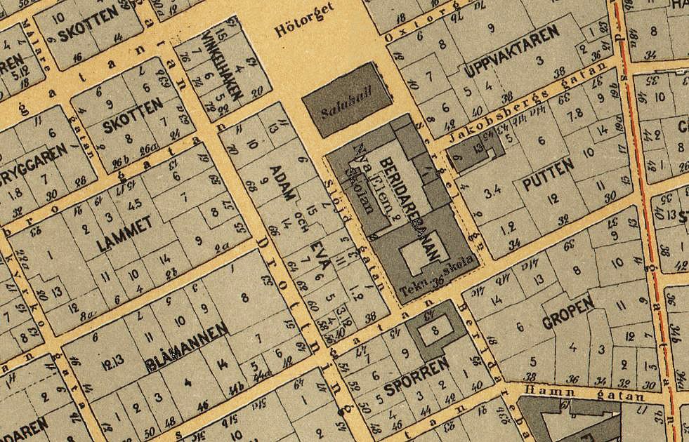 Stockholmskarta visande Kvarteret Adam och Eva, Beridarebanan, Gropen, Sporren mm